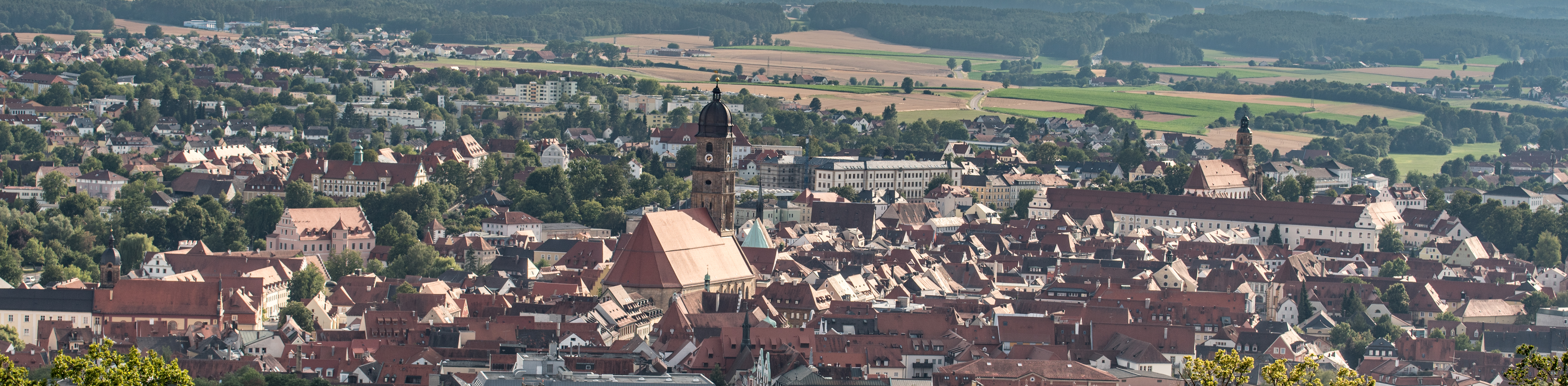 Amberg, Altstadt, vom Mariahilfberg